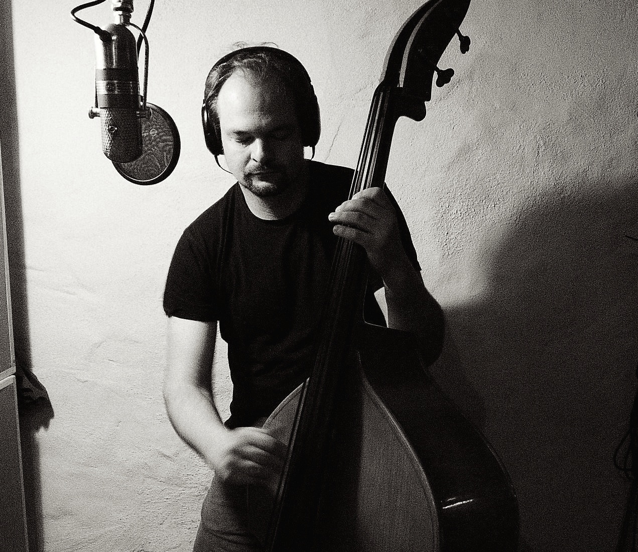 Claudio Strebel, Kontrabass